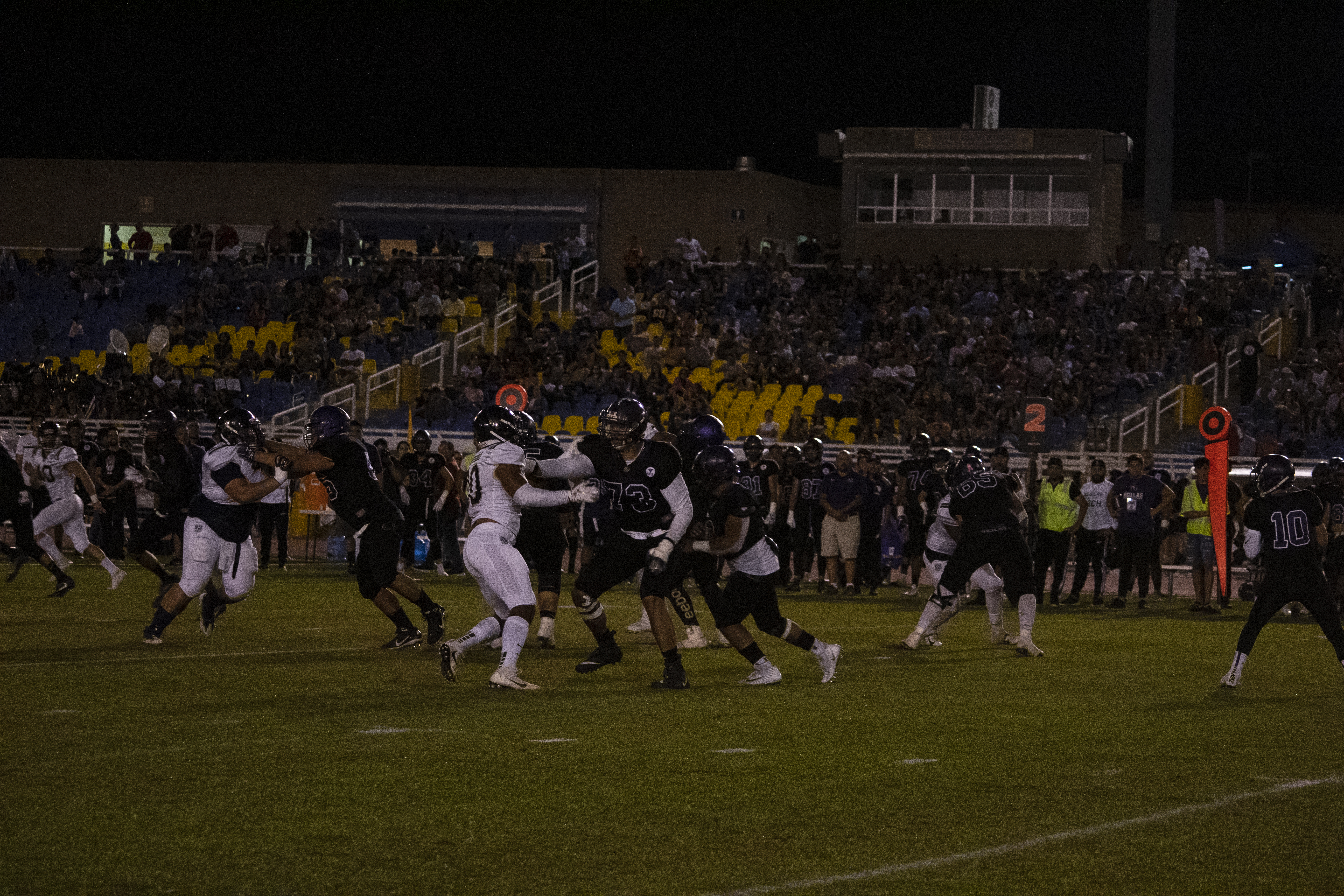 Las Águilas UACH jugando contra Pumas CU en el Estadio Olímpico de la UACH.